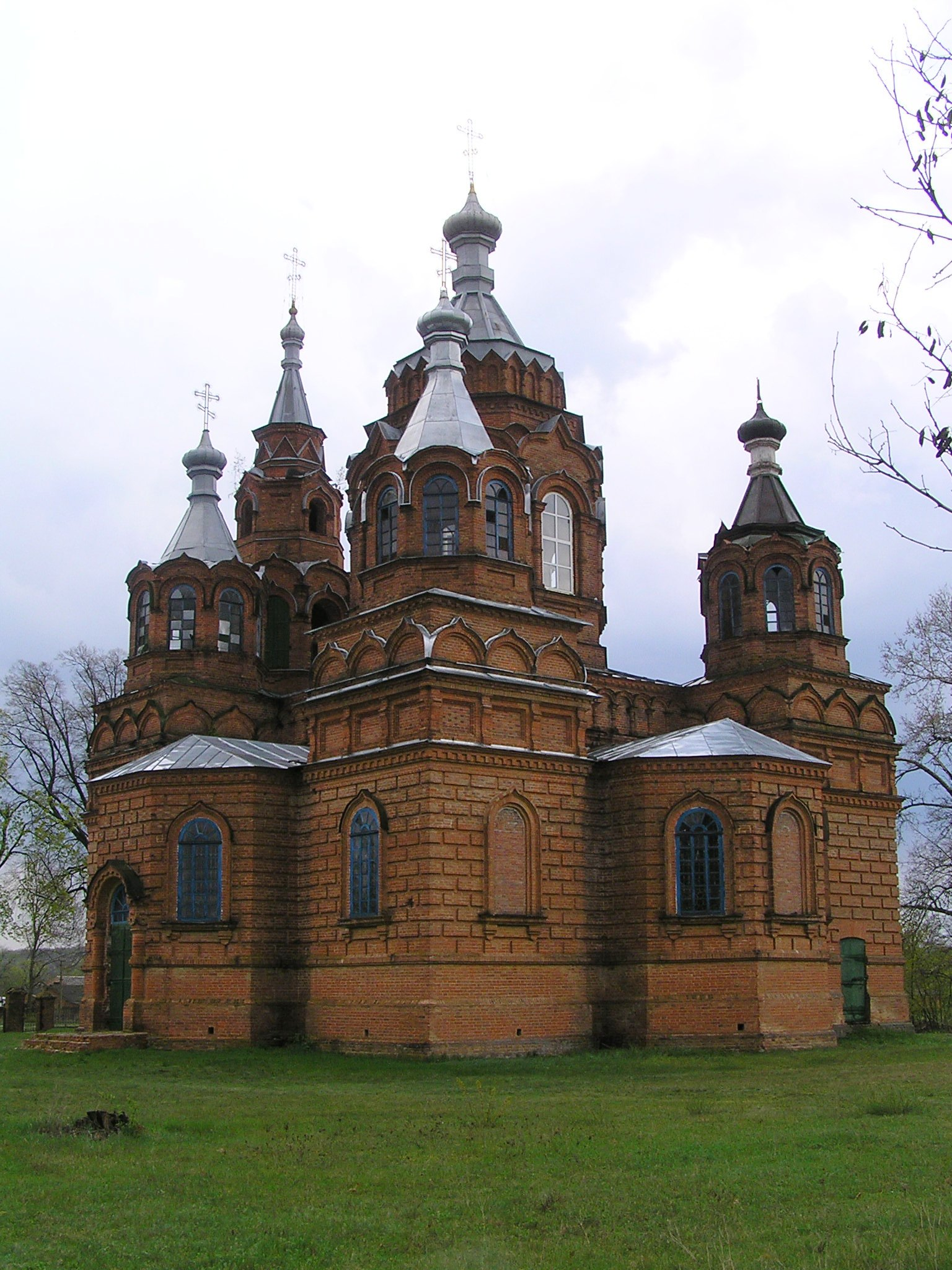 Миколаївська церква 1906р., с. Пустовійтівка, Роменський р-н, Сумська обл